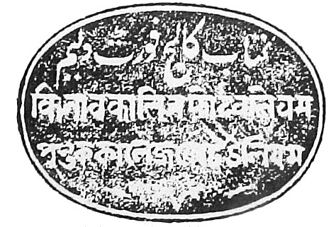 Stamp of the Fort William College